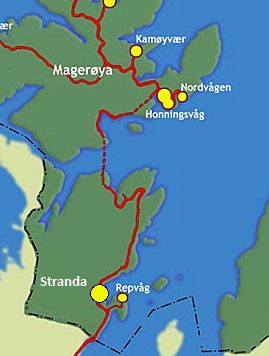 Stranda sin beliggenhet innenfor Nordkapp kommune.